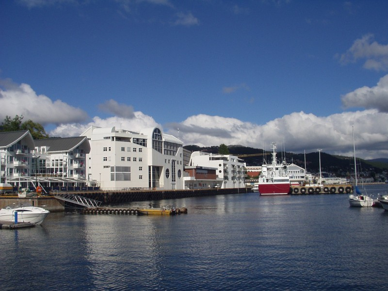 Description: Blick auf den Hafen von Molde Capture date: 2005-08-13 Photographer: sgm